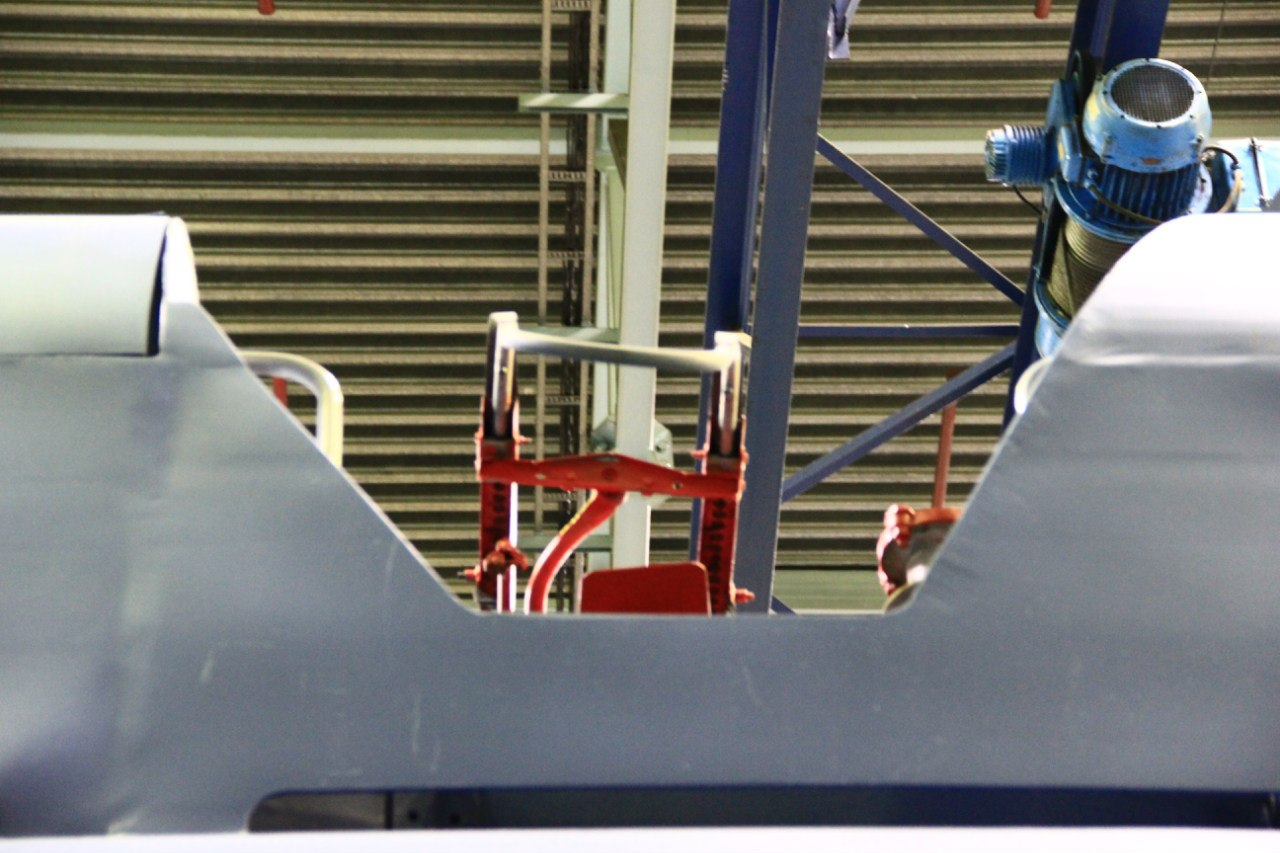 Пантограф ТП-250 электропоезда ЭС250 "Сокол"